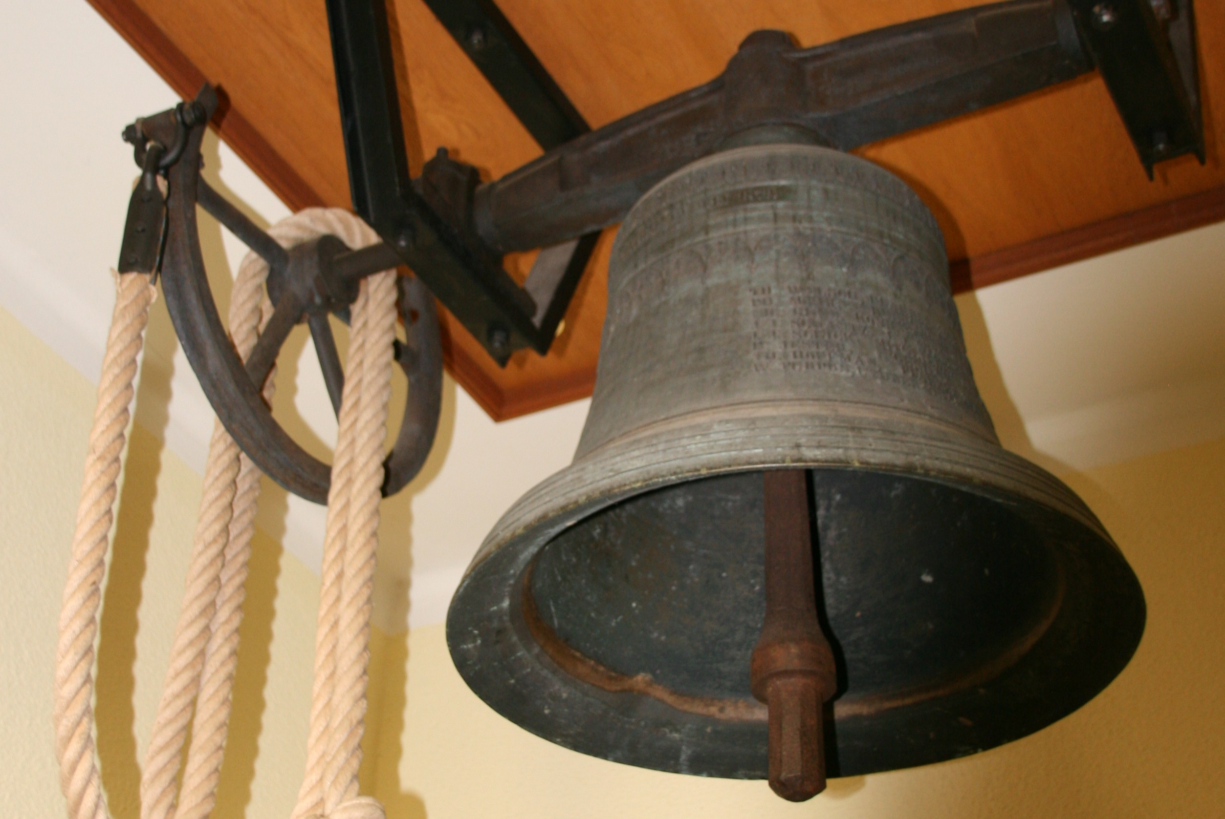 Alte Glocke im Eingangsbereich der Protestantischen Kirche in Mechtersheim, nach den Kriegszerstörungen 1944 aus der alten Kirche gerettet